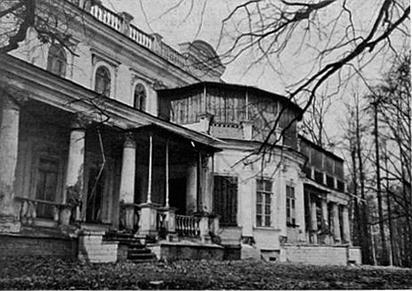 Усадебный дом в Мурзинке